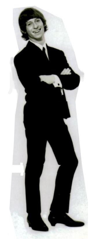 Imagen de Hugo Fattoruso de la foto para el álbum "Rompan Todo (Break it All)" de 1965. Foto tomada en Argentina en 1965.